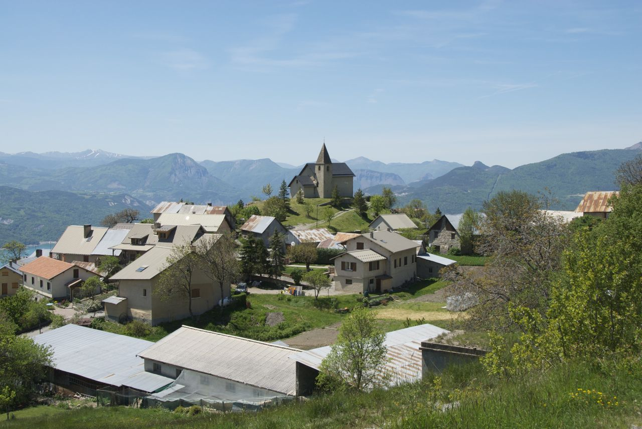 Saint-Apollinaire (Hautes-Alpes)